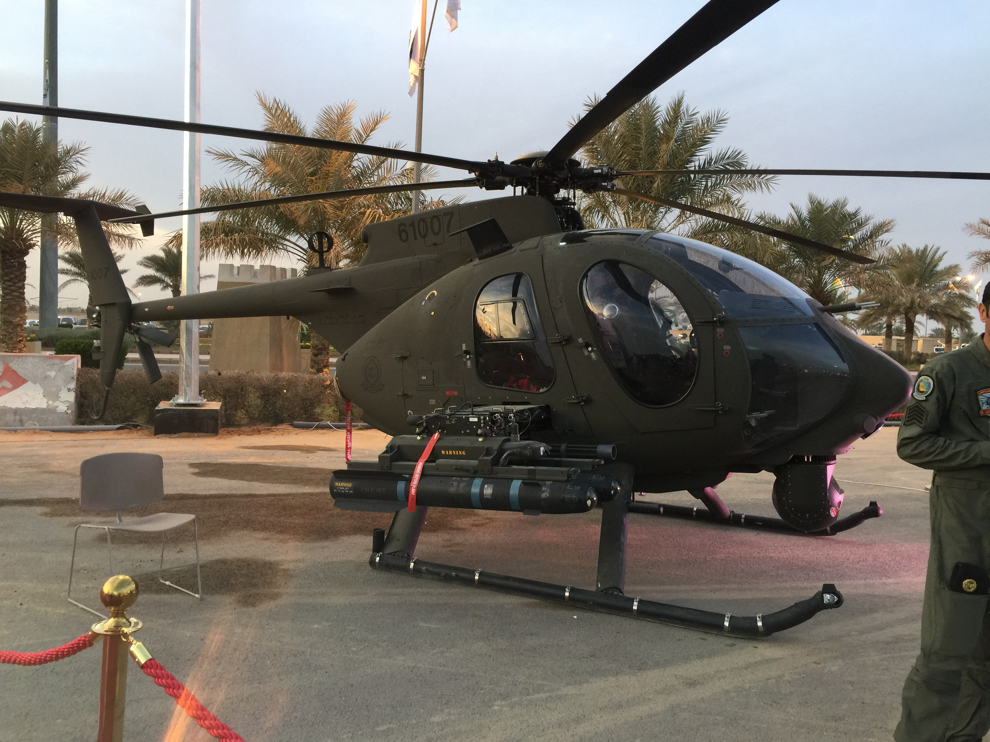 مروحية ليتل بيرد التابعة للحرس الوطني السعودي في معرض الجنادرية.